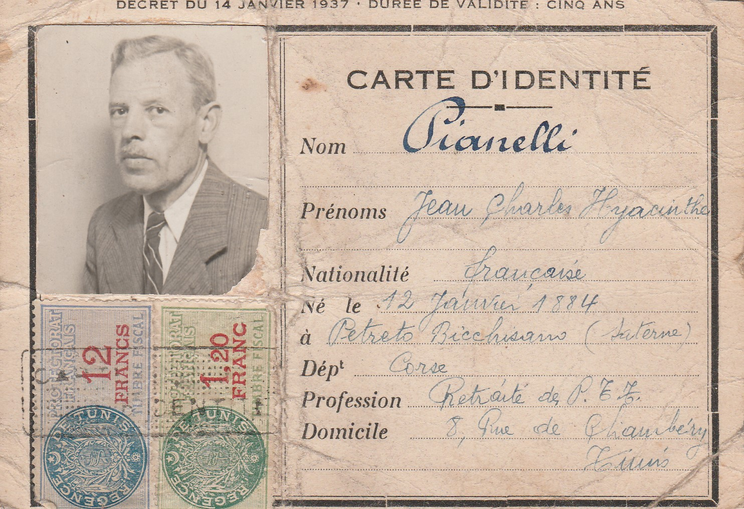 Carte réalisée dans le protectorat tunisien.